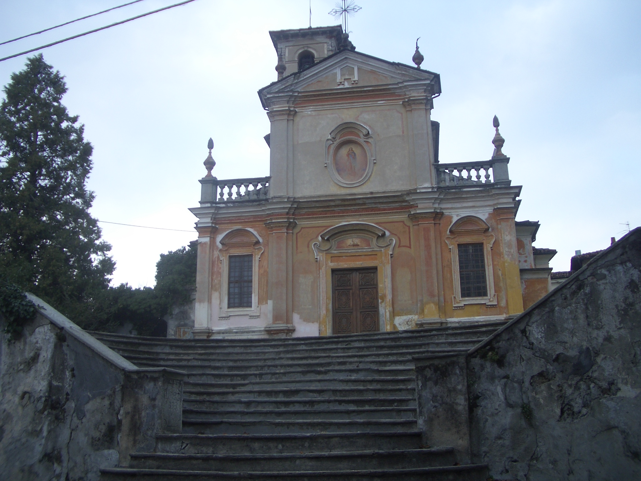 Chiesa parrocchiale dei Santi Pietro e Paolo, parish church, Burolo, Torino, Italy